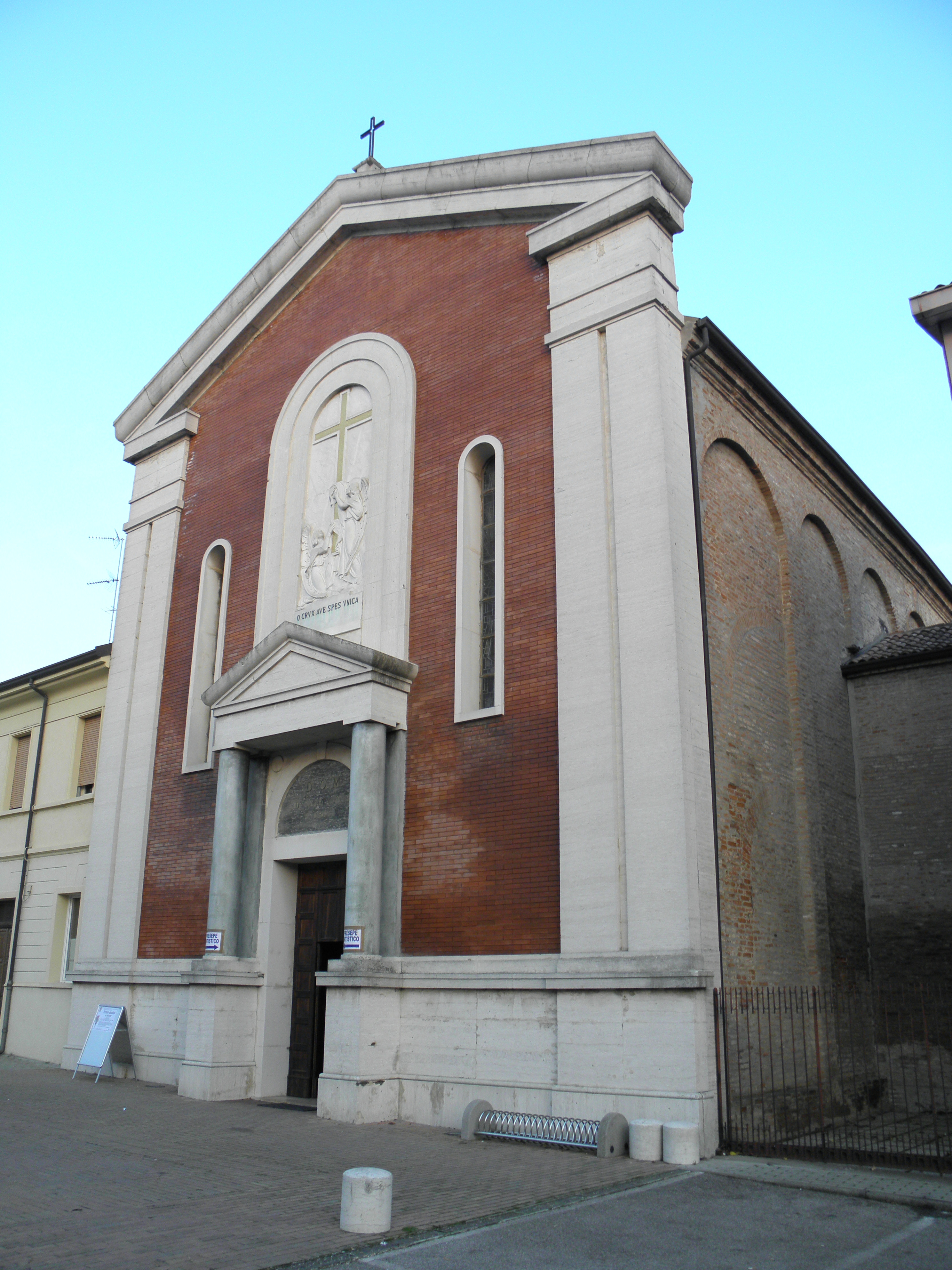 Migliarino, già comune autonomo e dal 2014 frazione di Fiscaglia: la chiesa parrocchiale di Santa Croce, edificio del tardo XVI secolo con facciata rifatta nel 1932.